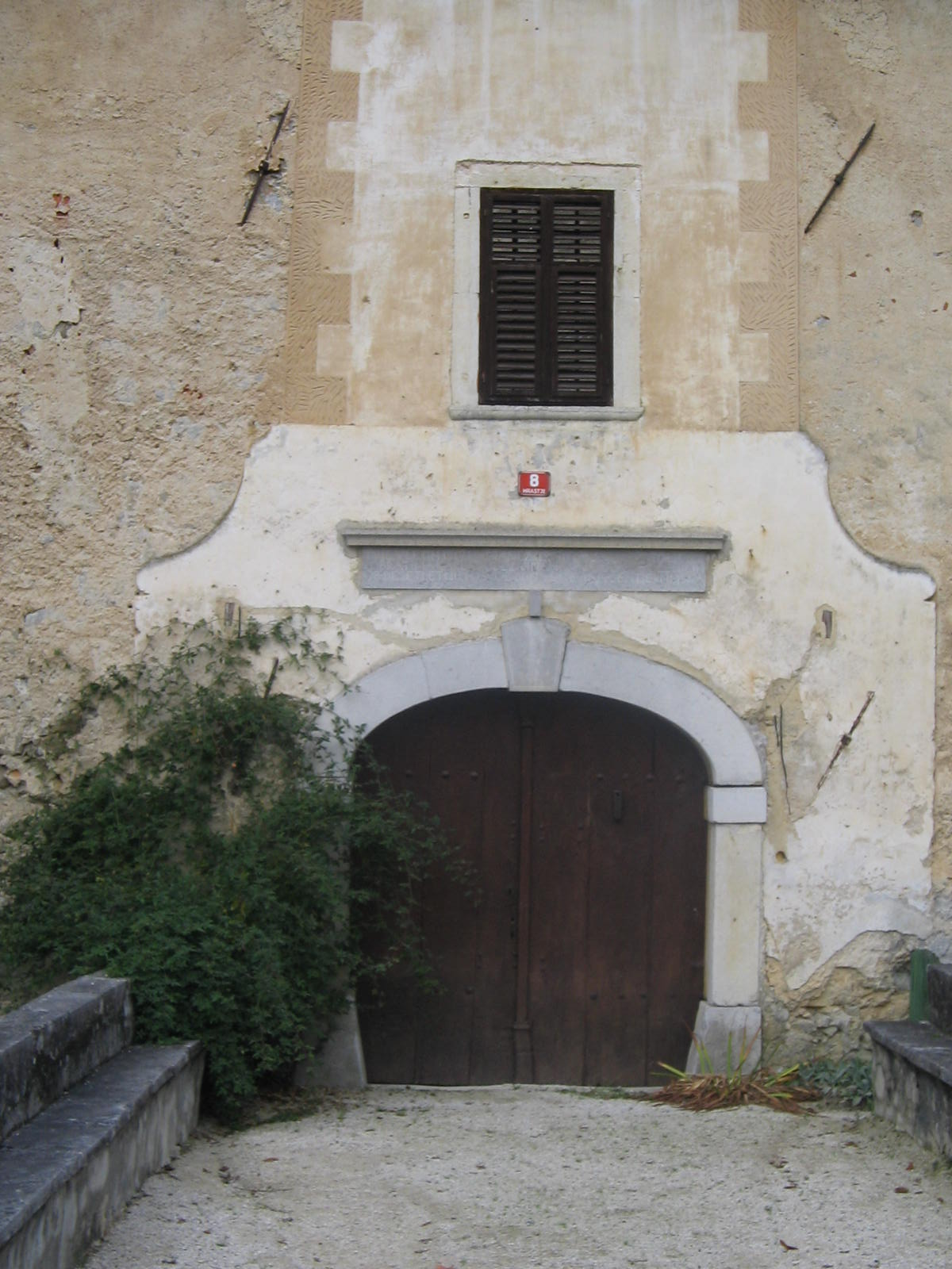 Gracarjev turm Castle, Slovenija, nahe Šentjernej, Slovenija Quelle: eigene Aufnahme 9. Nov. 2005 Fotograf: Janez Novak, Ljubljana, Slovenija